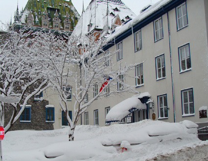 La Maison Kent en hiver